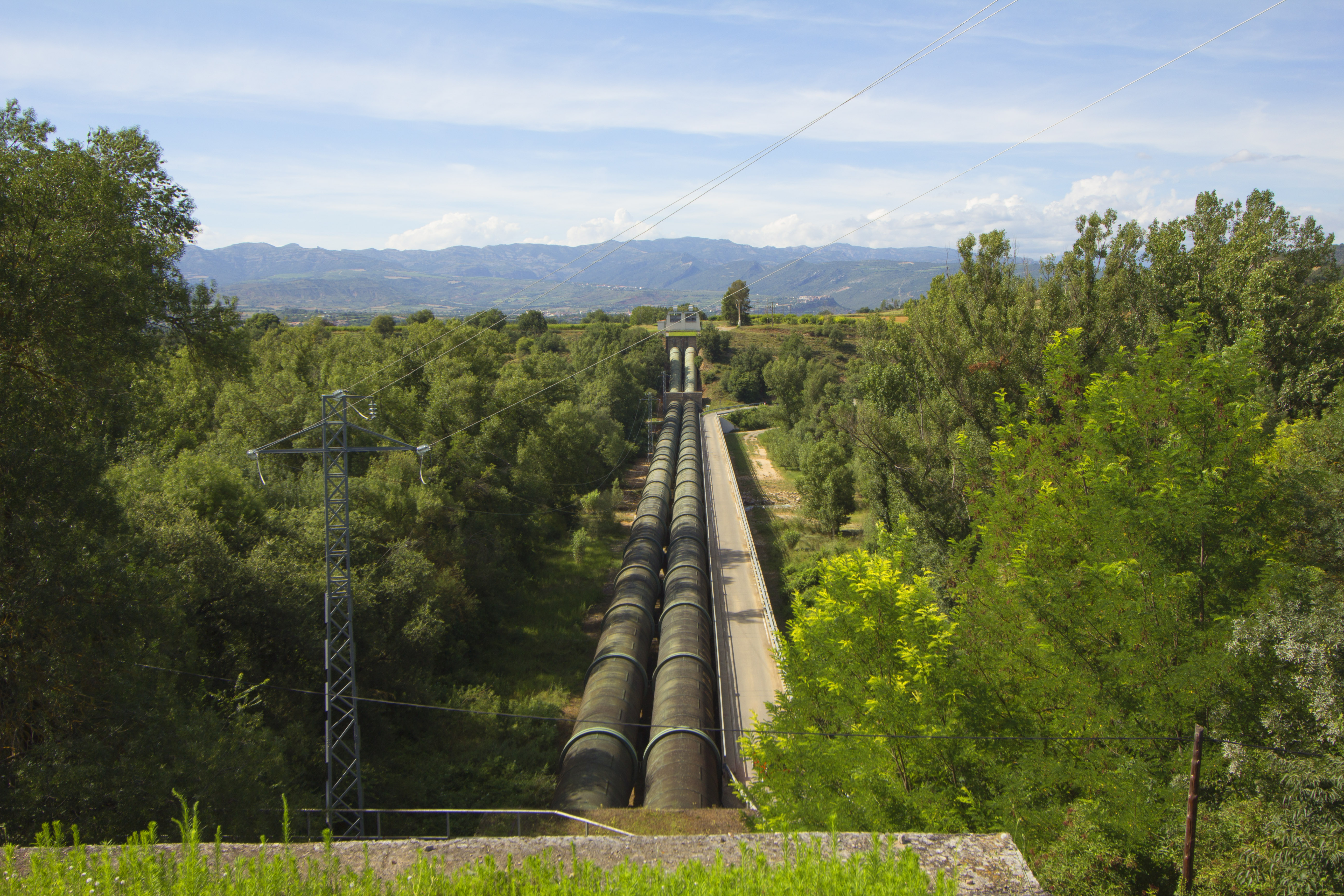 Conductes forçats atravessant el riu Gavet, Gavet de la Conca (Pallars Jussà)